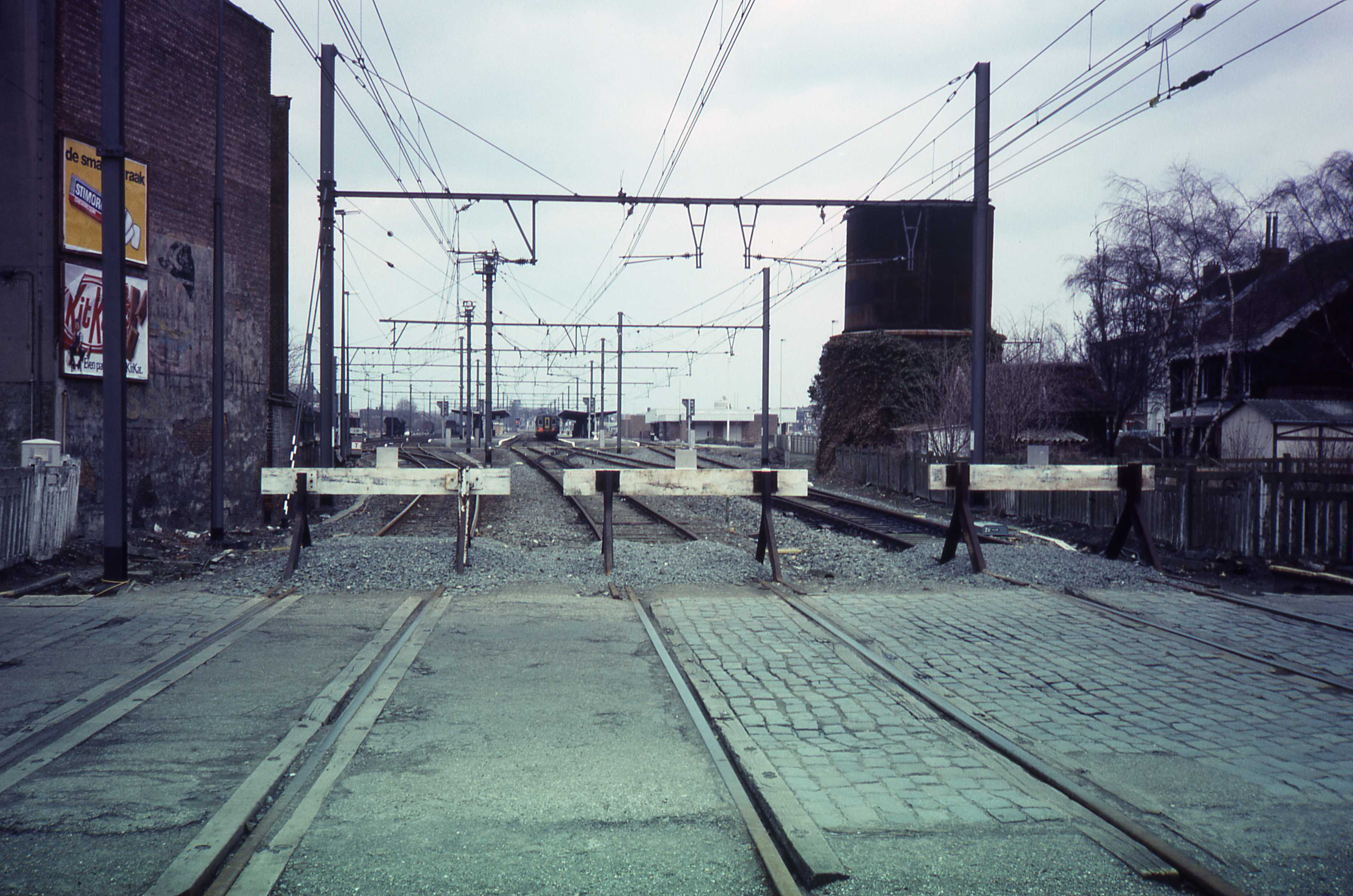 De stootbuffers van het station Boom op de sporen die naar de brug doorliepen.